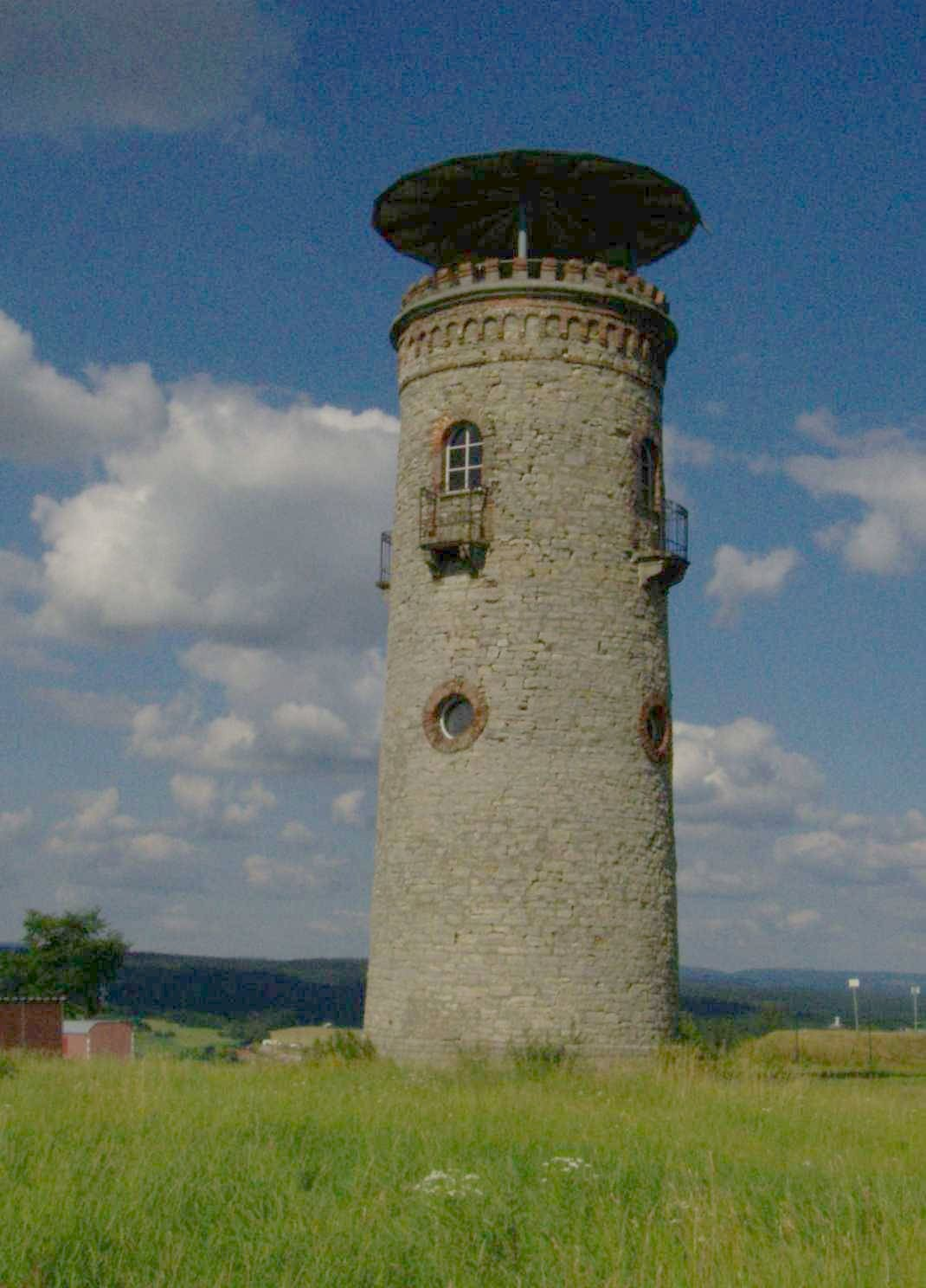 Der Bismarchturm auf dem Hildburghausener Stadtberg; Thüringen, Deutschland